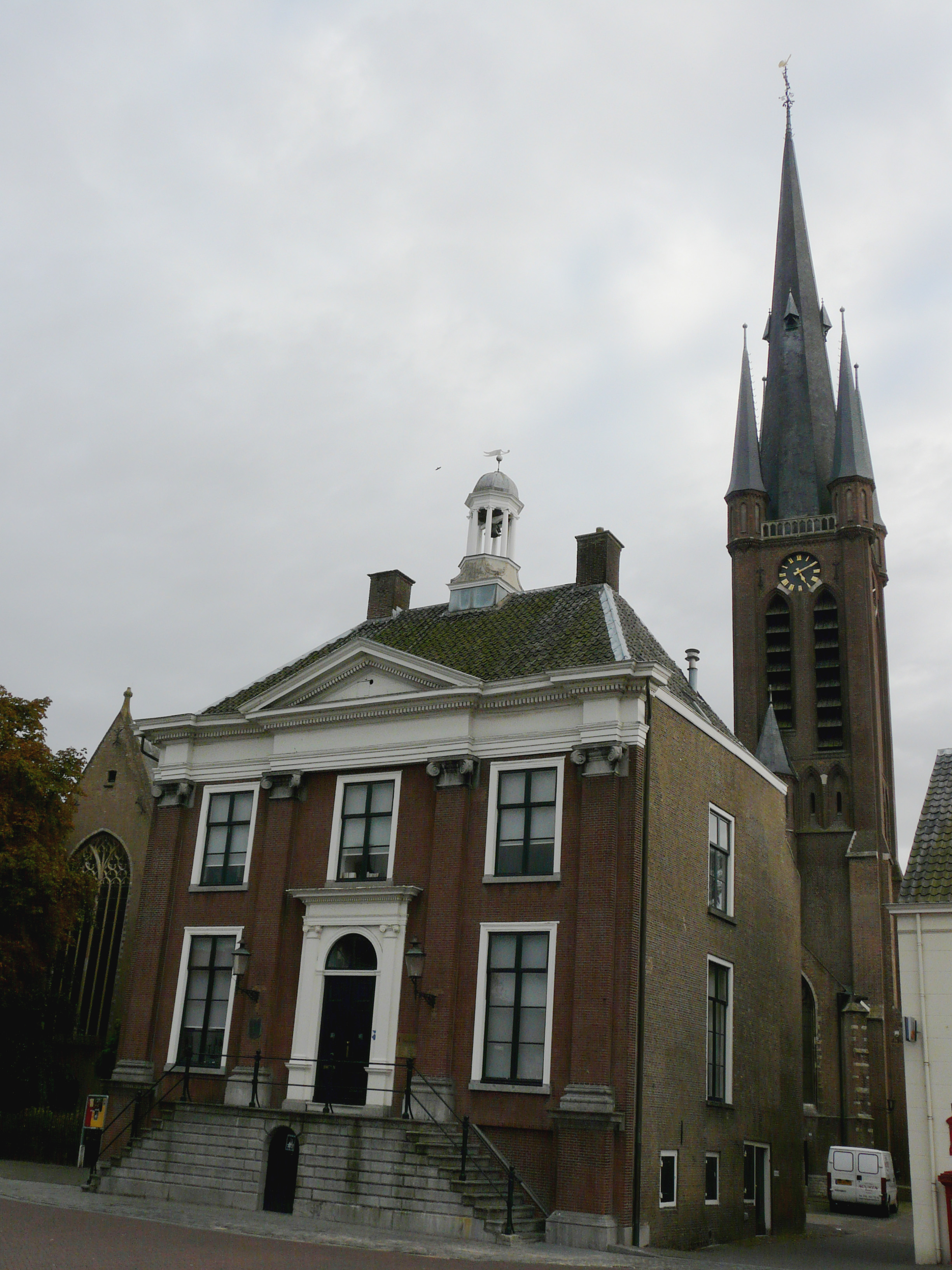 Zicht op deel van het voormalige Oude Raadhuis gevestigd aan de Haagsemarkt in Princenhage in Breda